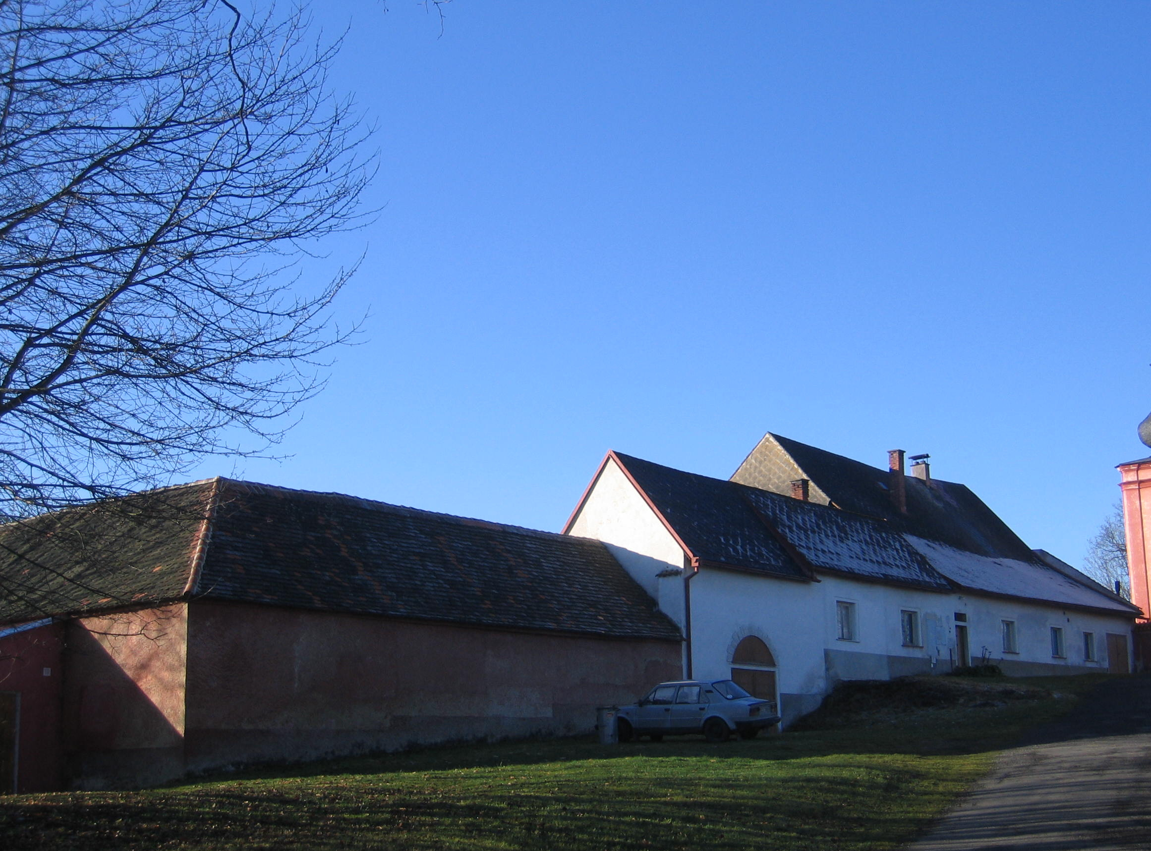 Strašín čp. 1 (okr. Klatovy), fara od severovýchodu.